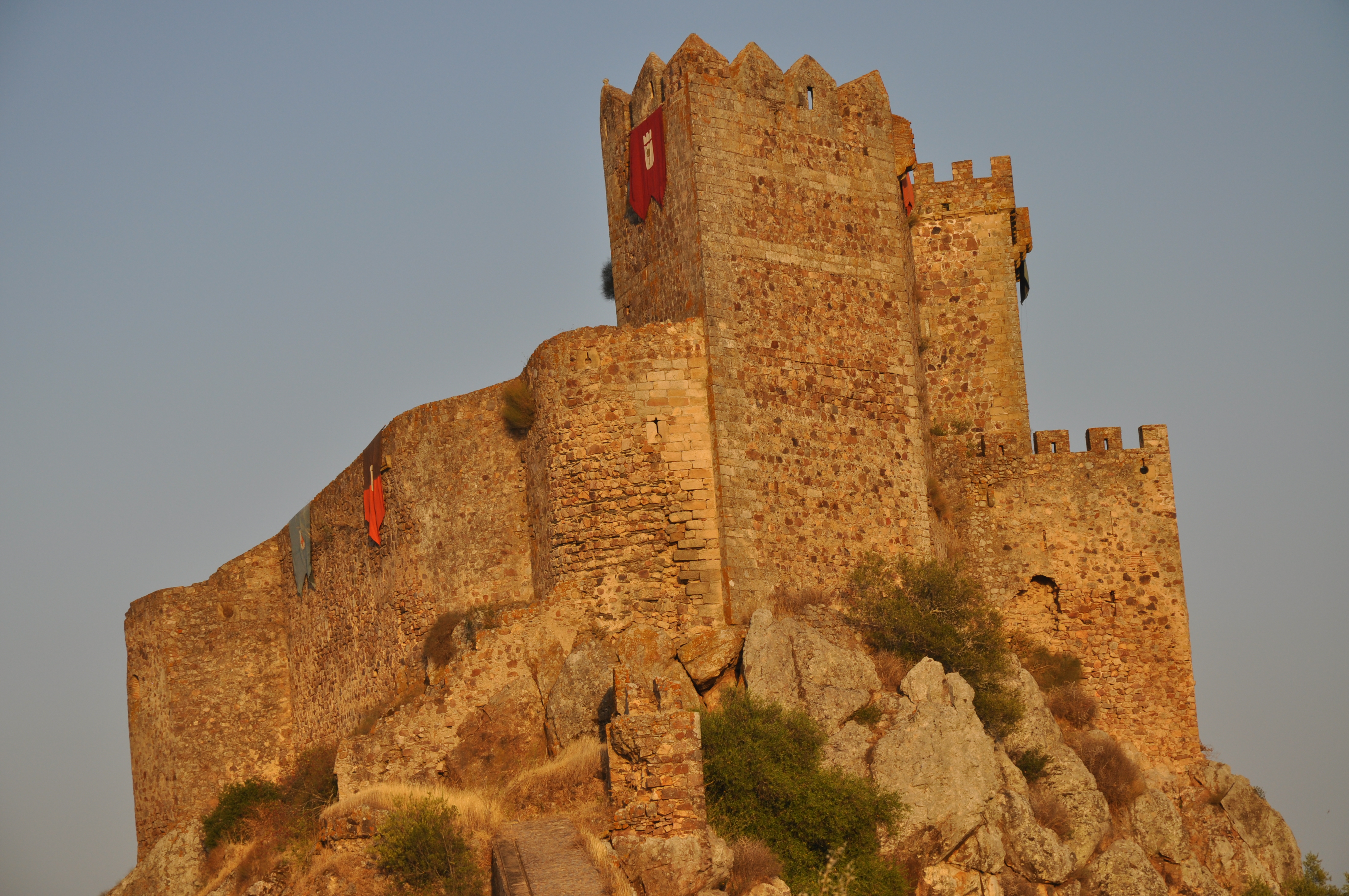 Fiesta Medieval Festival Medieval de Alburquerque This is a photography of a Folklore festival in Spain (Wikidata id Q23662027).